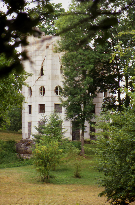 Désert de Retz, Chambourcy